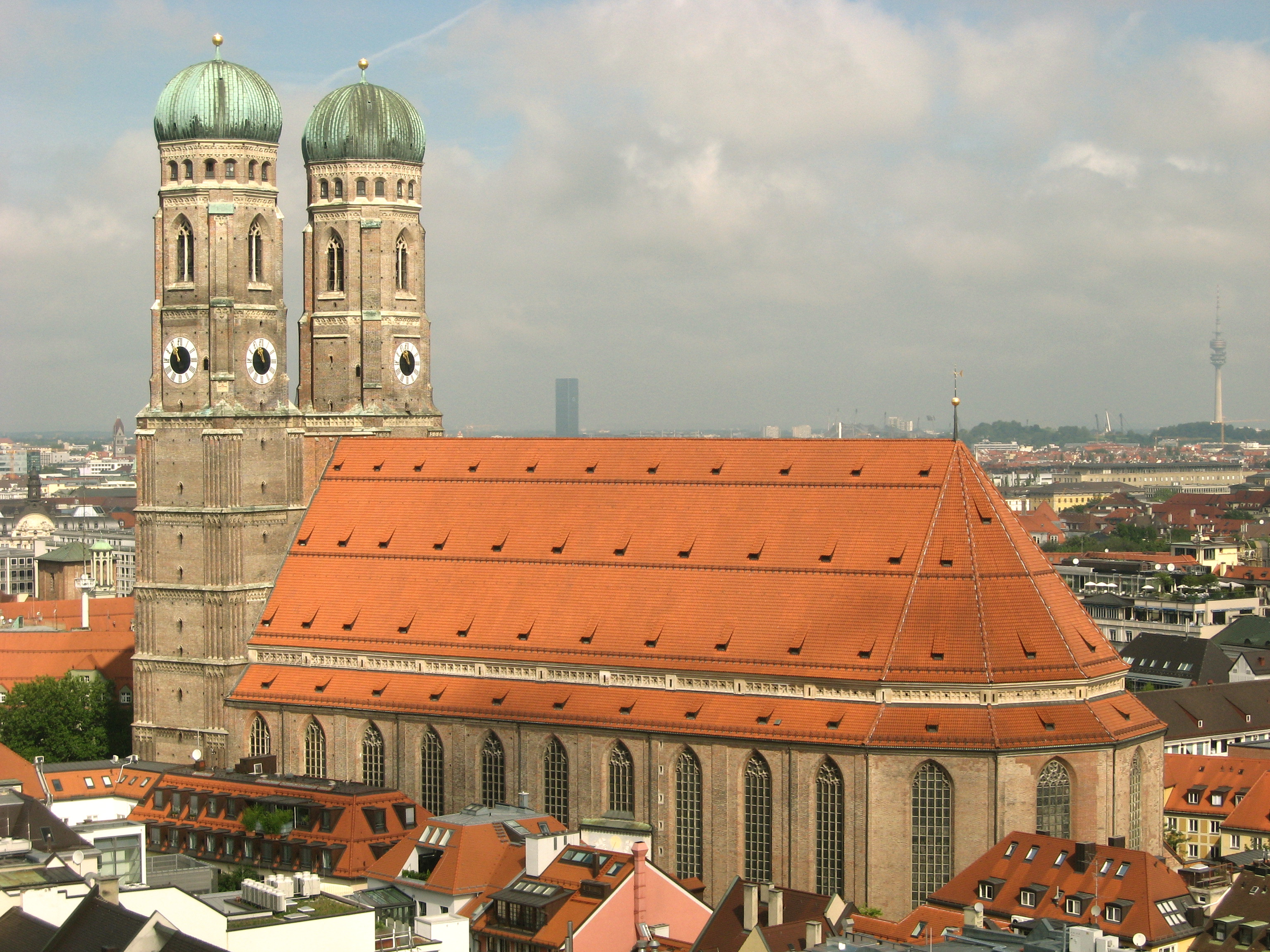 Frauenkirche im München, Frauenplatz 1